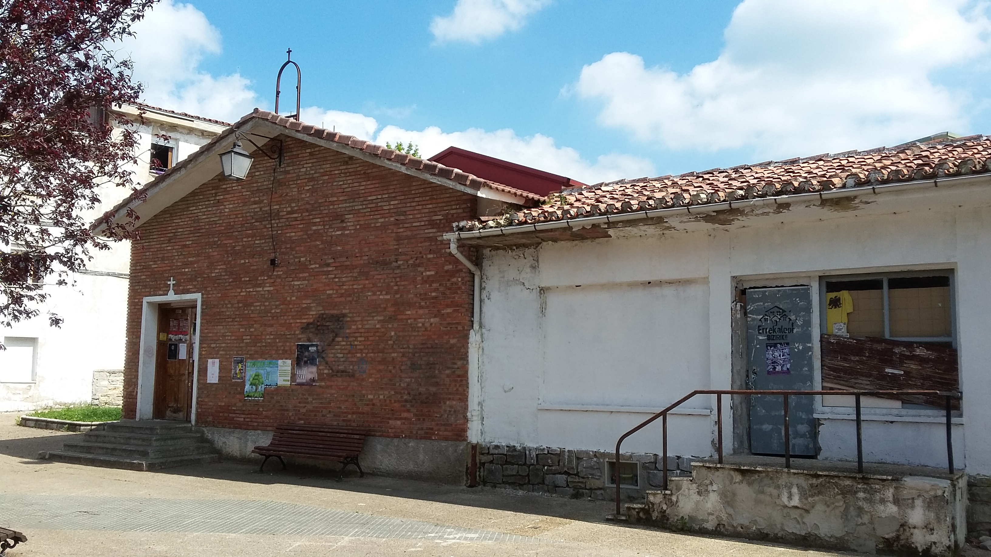 Barrio de Errekaleor, Vitoria-Gasteiz, Álava, País Vasco (España). Antigua iglesia parroquial reconvertida en gaztetxe.